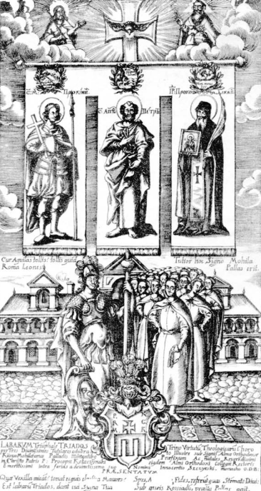 КИЄВО-МОГИЛЯНСЬКА АКАДЕМIЯ ТА ЇЇ ВИХОВАНЦI. Гравюра.